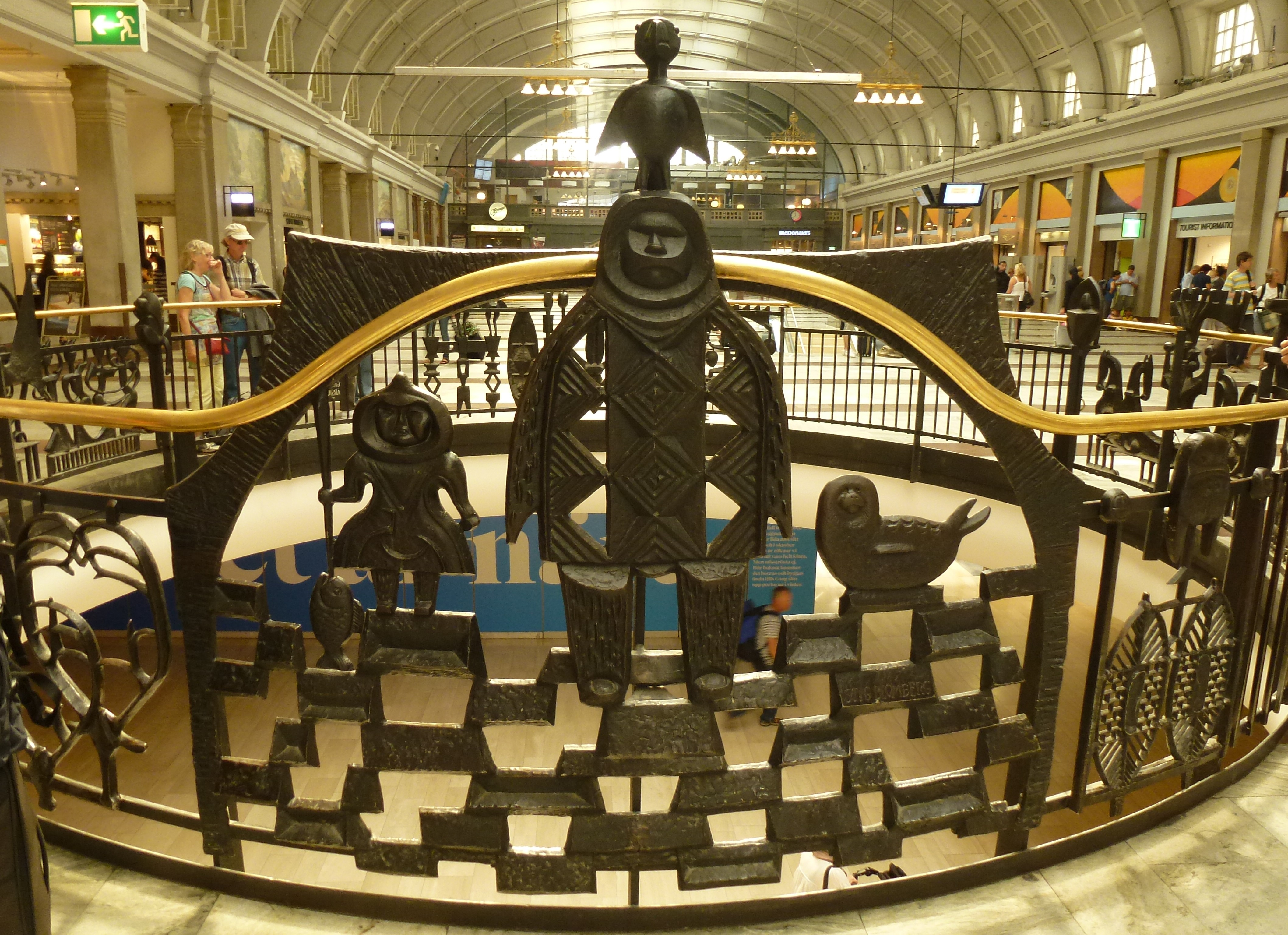 Ringen eller "Spottkoppen" i Stockholms Centralstation, räcket är skapat av skulptören Stig Blomberg